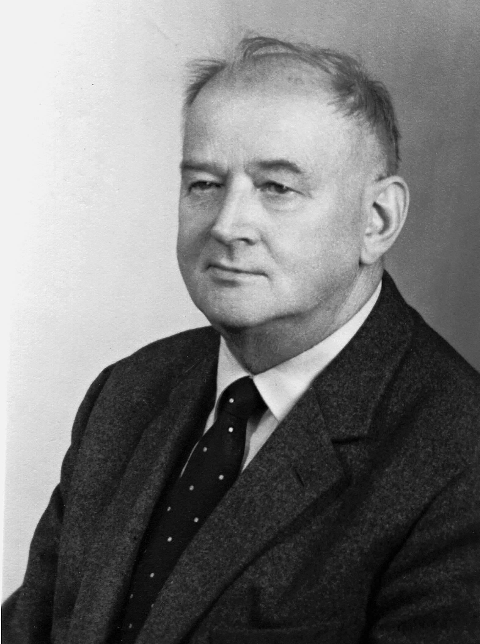 Ein Passfoto von Franz Kessler